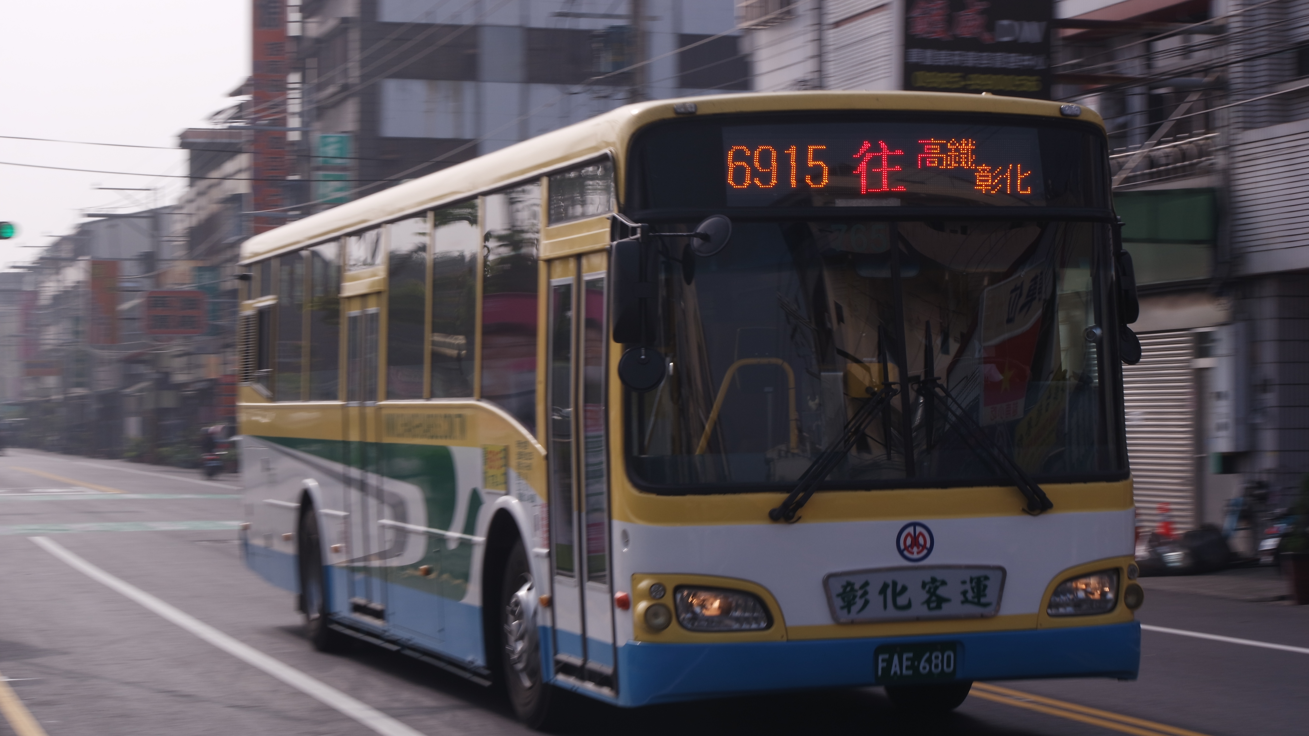 田中鎮彰化客運高地板巴士FAE-680(前身為新店客運轉賣之車輛)